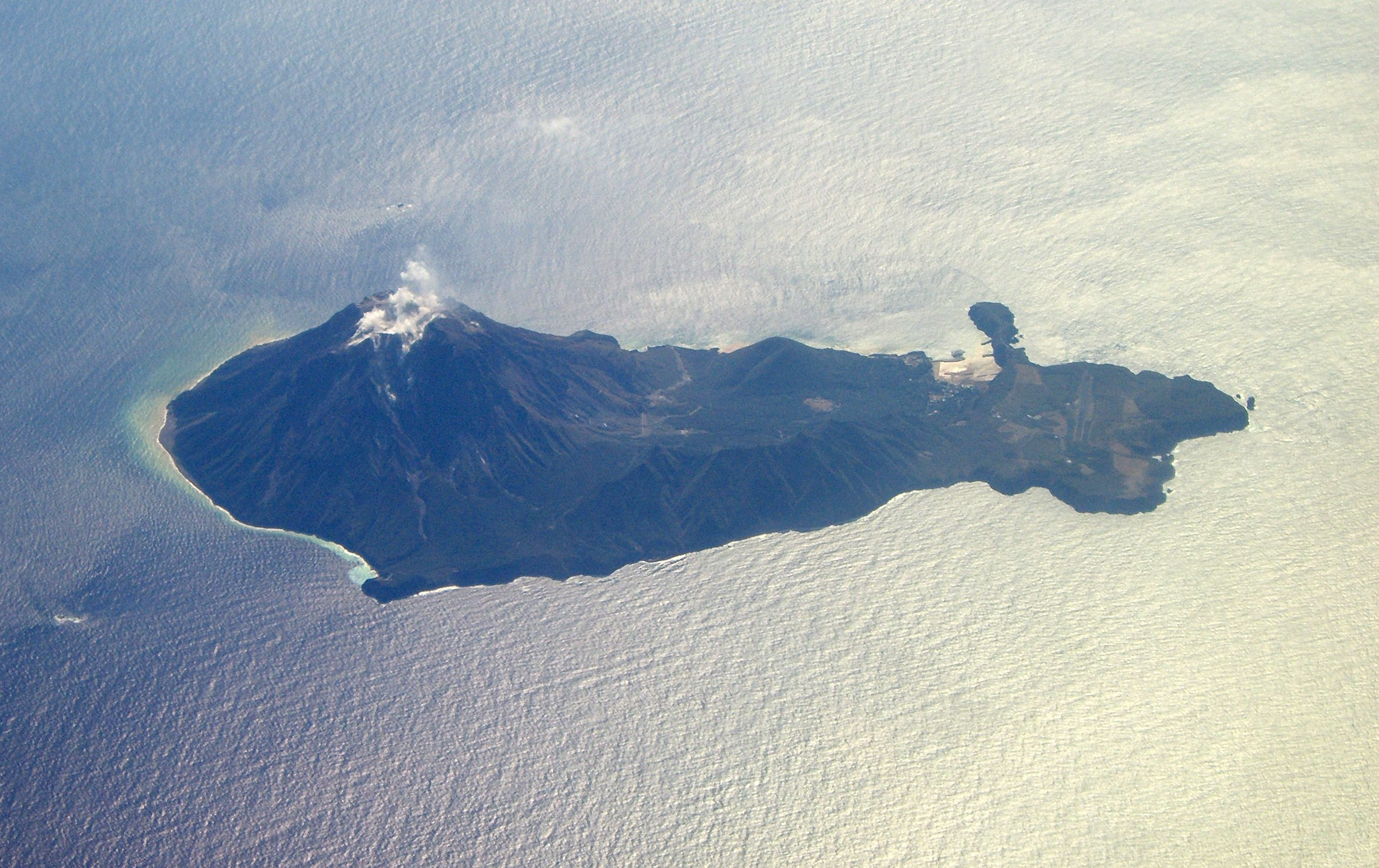 Iōjima Island in Kagoshima, Japan.(鹿児島県にある硫黄島。上空より撮影。)